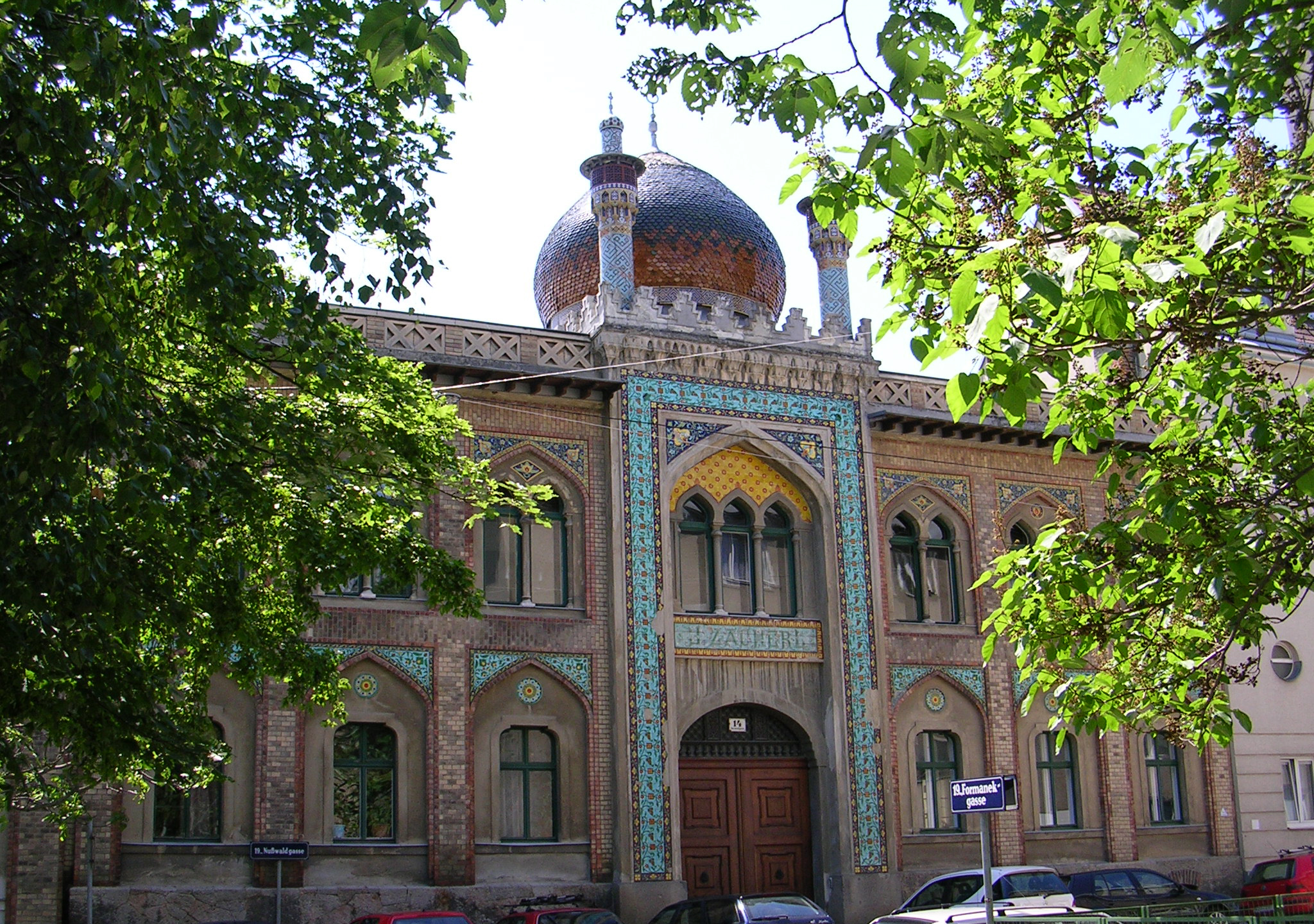 Zacherl factory in Unterdöbling (Unterdöbling)(Sculptures by Franz Metzner)